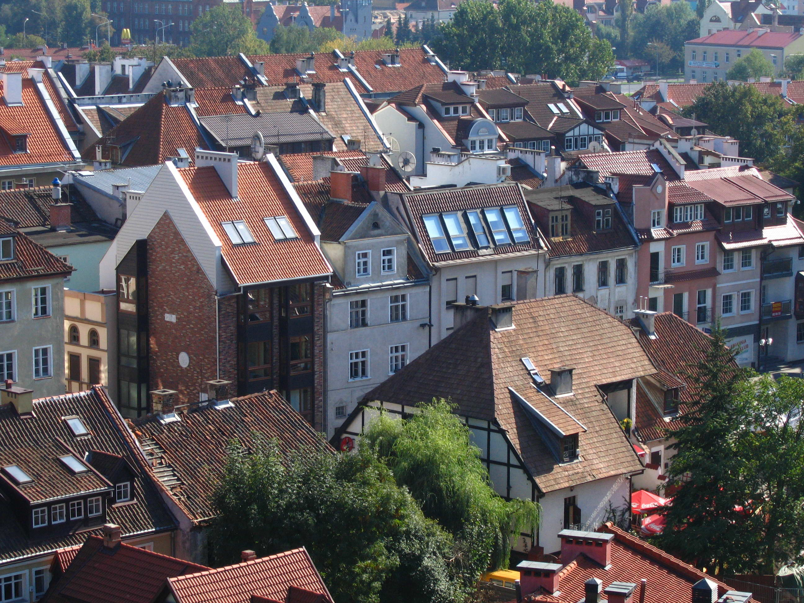 Widok Starego Miasta z okien wieży olsztyńskiego zamku